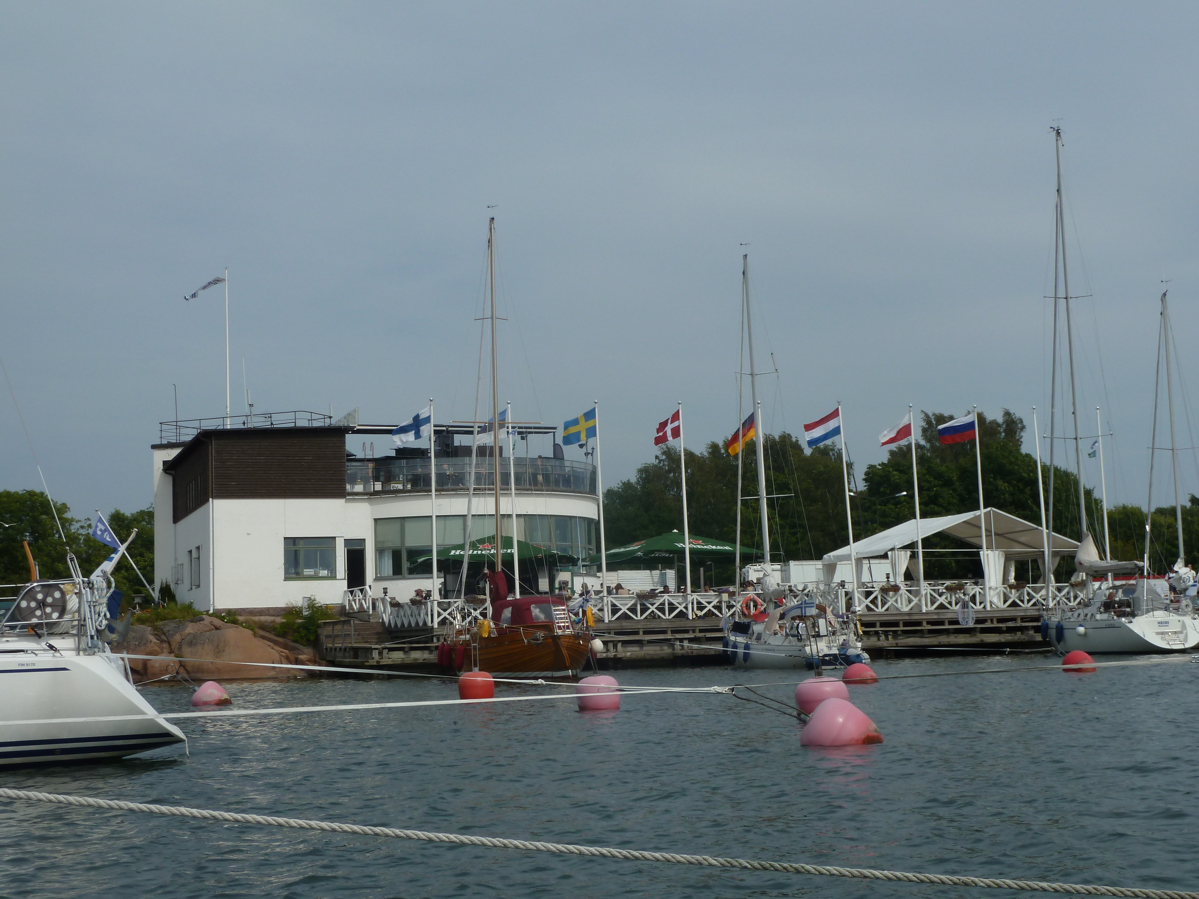 Hangö Segelförenings paviljong 2012